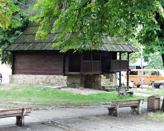 Kušića han u Ivanjici